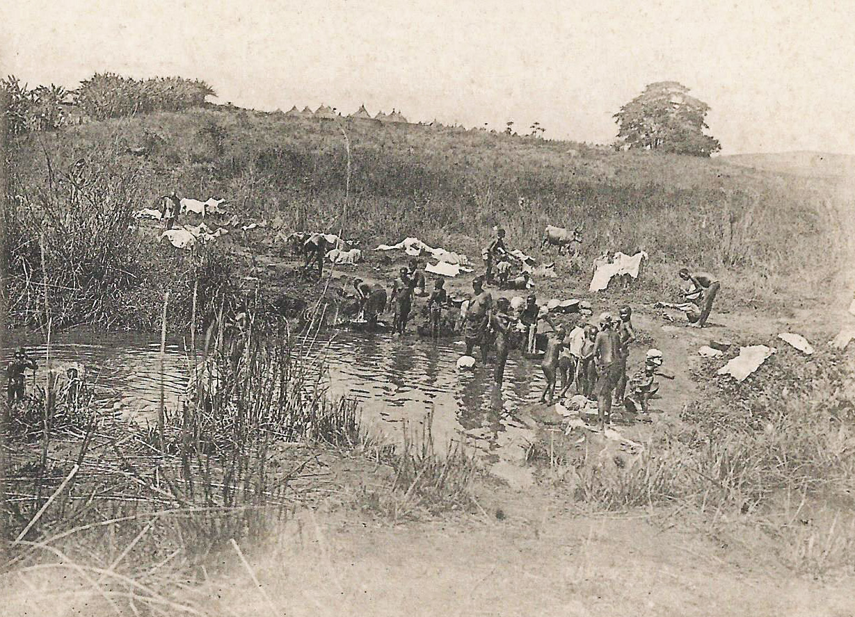 Environs de Beyla. Logo SFE (Société française d'électrographie) Colonies françaises. Haute-Guinée.